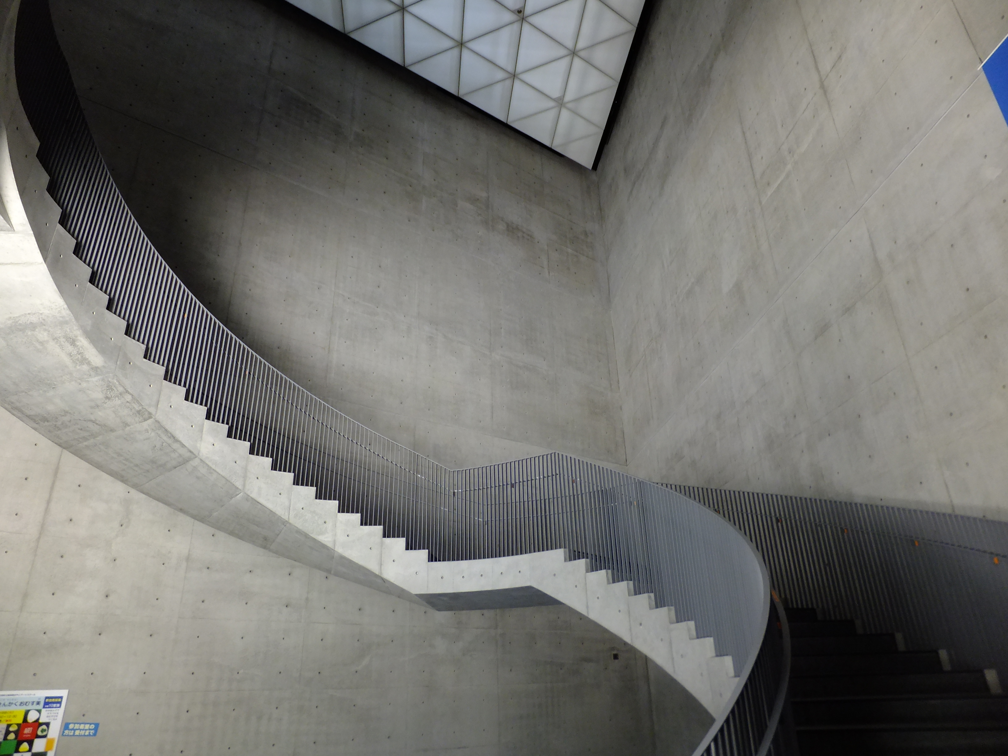 秋田県立美術館 平野政吉コレクションエントランス階段。三角形の室内空間と支柱のない構造の階段が特徴である。